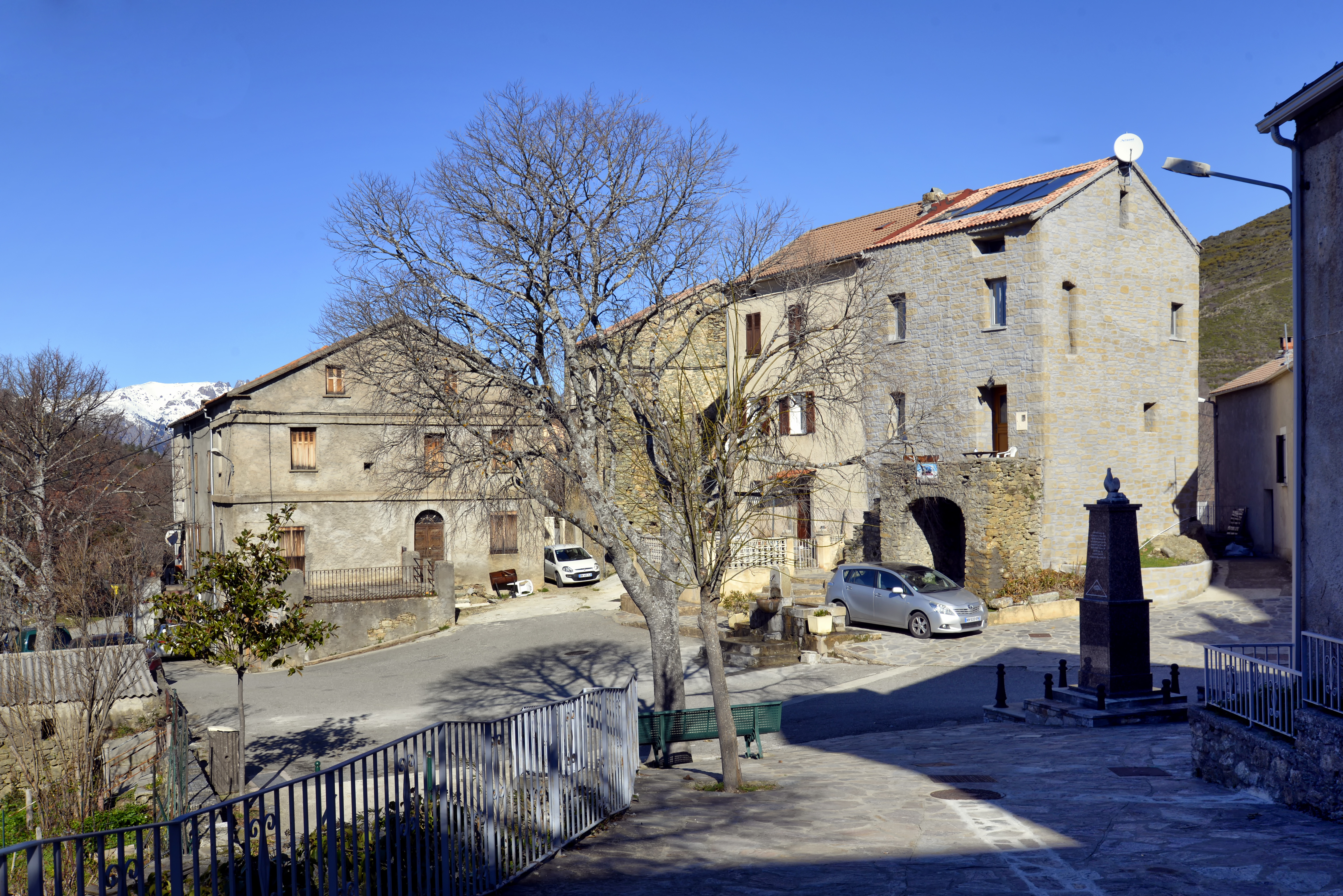 Santa-Lucia-di-Mercurio, Bozio (Haute-Corse) - Place de l'église (Piazza à a ghjesa) ou place du village